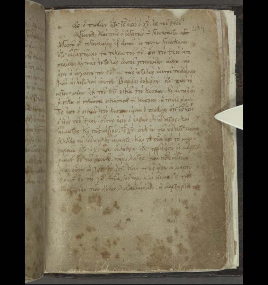 Cod. Montfortianus page 434 recto 1 John 5 Comma